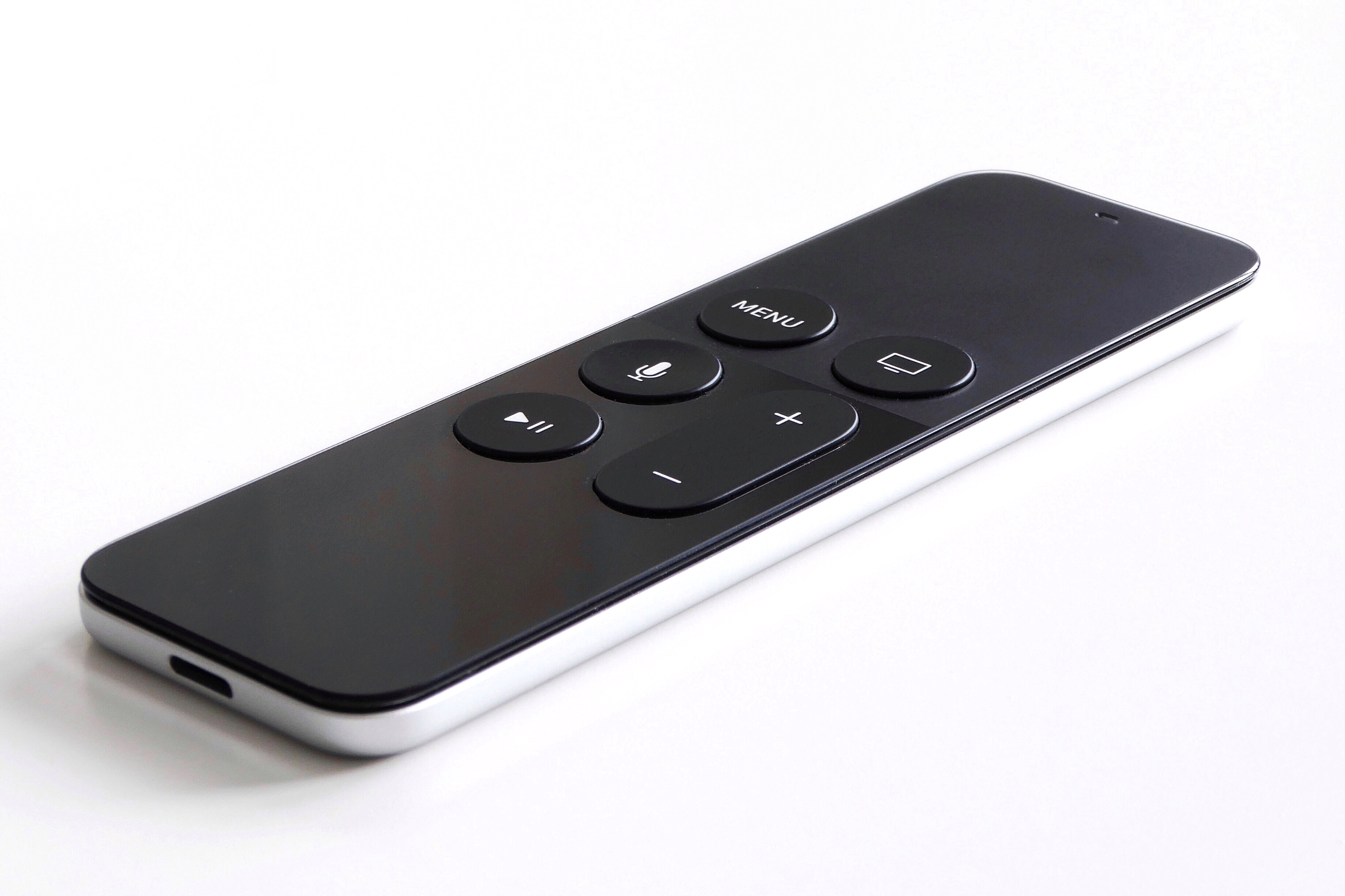 Fjärrkontroll till Apple TV generation 4. Även kallad Siri remote.